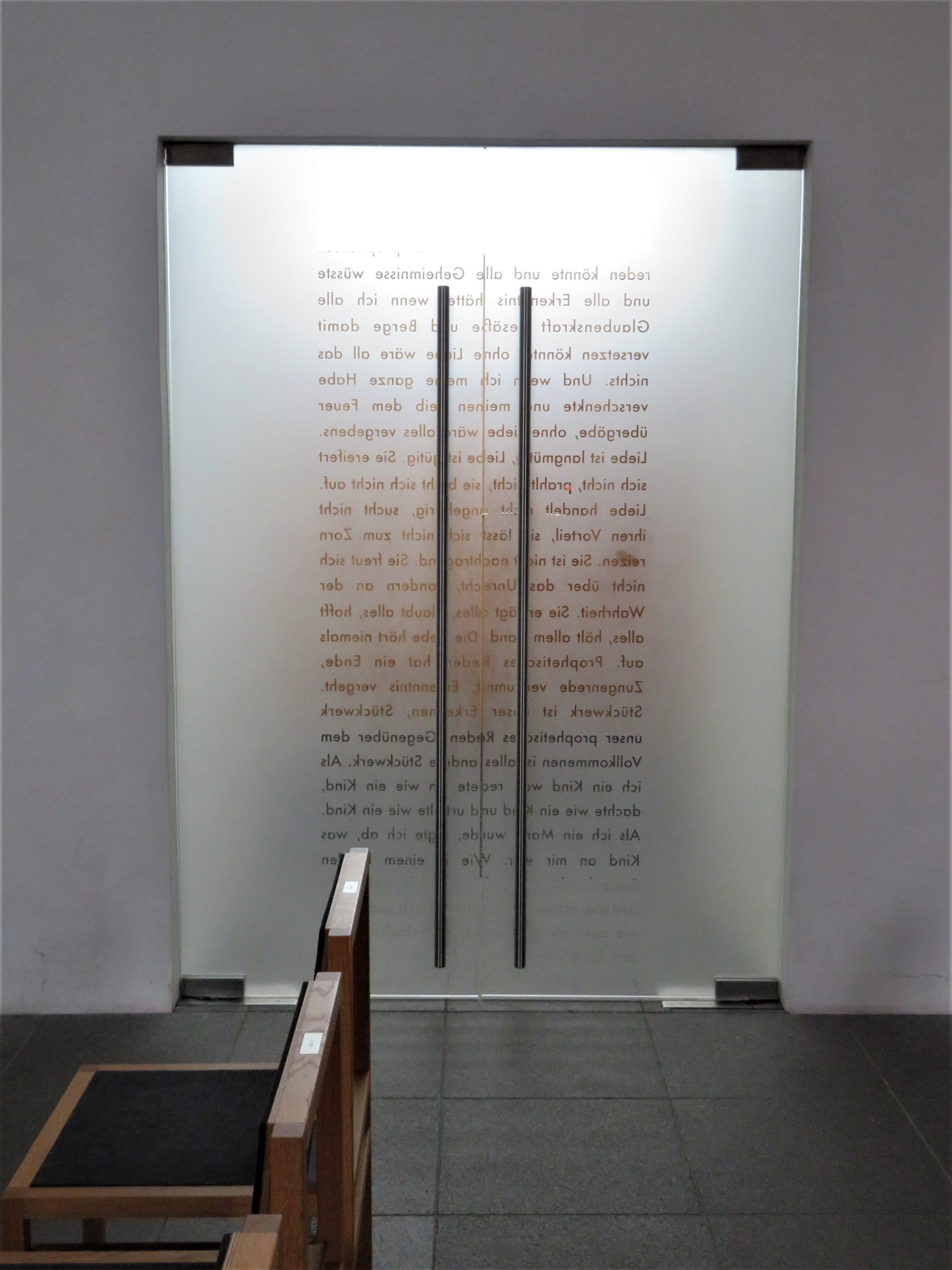 Pfarrkirche Ternberg, Paulustor von innen gesehen